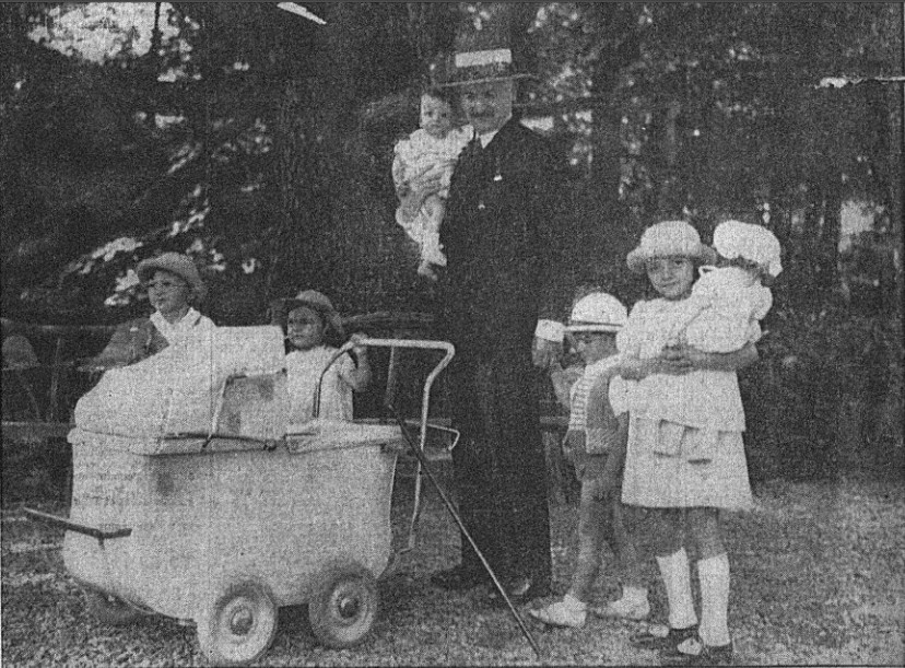 Le président Albert Lebrun avec ses petits-enfants au château de Vizille le 16 août 1936.